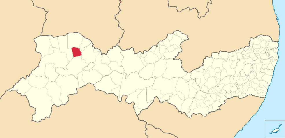 Mapa de Granito (2)